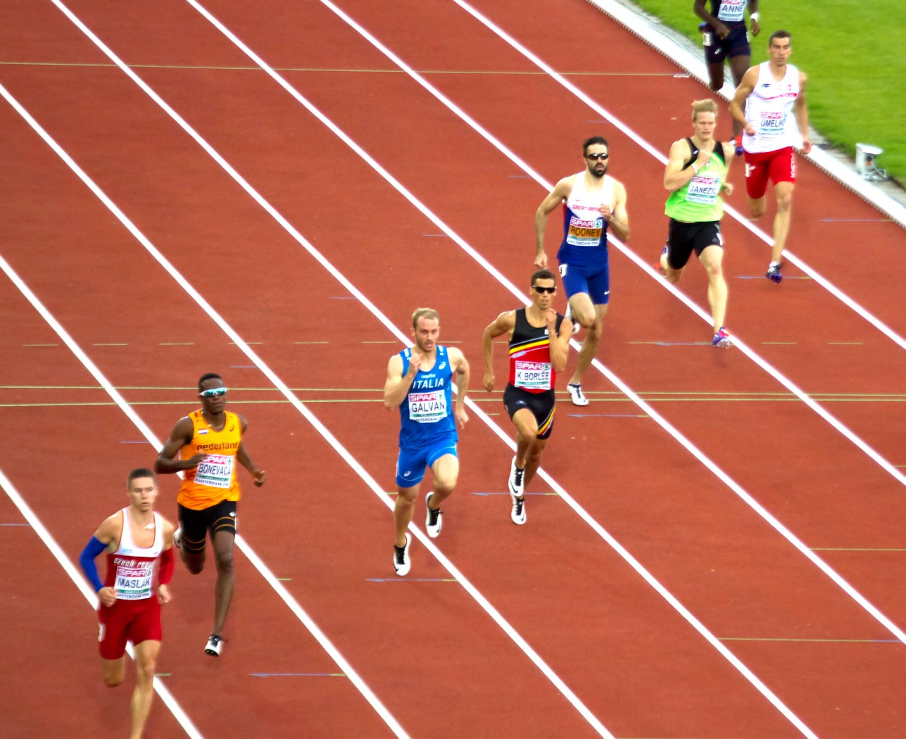 5218 finale 400m mannen